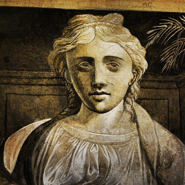 Affresco Sala del Castello di Capua presso Gambatesa (CB) This is a photo of a monument which is part of cultural heritage of Italy.